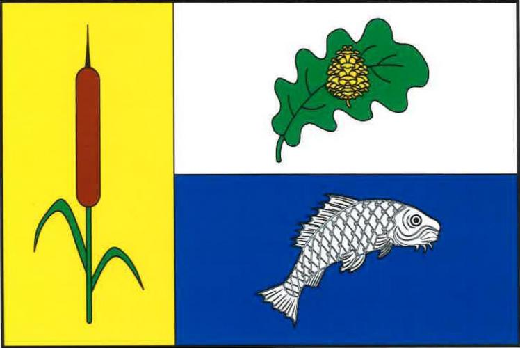 Strašov vlajka